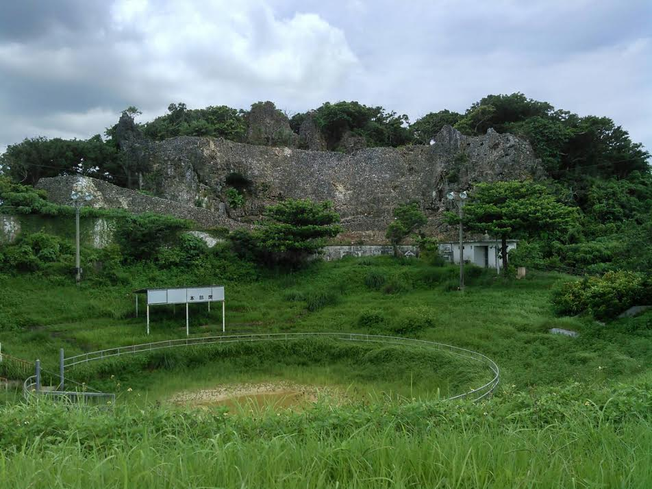 安慶名城（沖縄県うるま市）